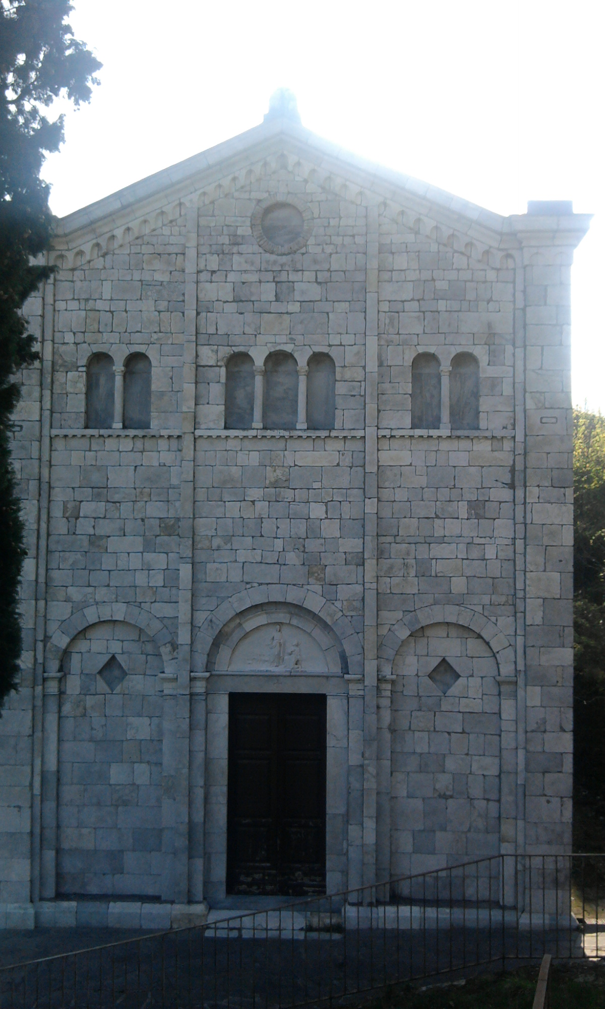 La chiesa di Retignano nel 2012